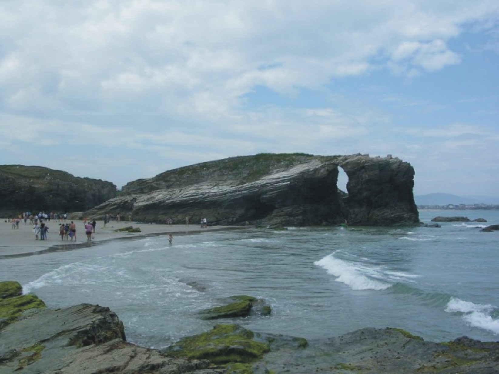 unha foto da zona das catedrais {